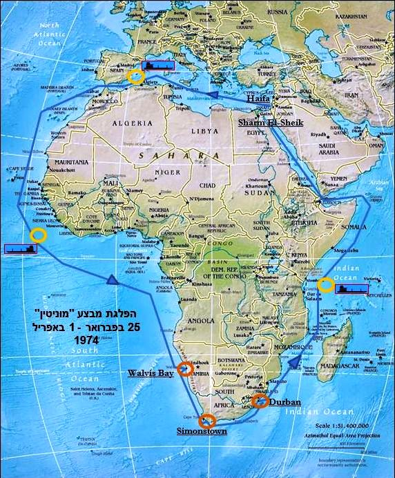 מסלול הפלגת הספינות מחיפה לשארם א-שייח' פברואר -מרץ 1974.